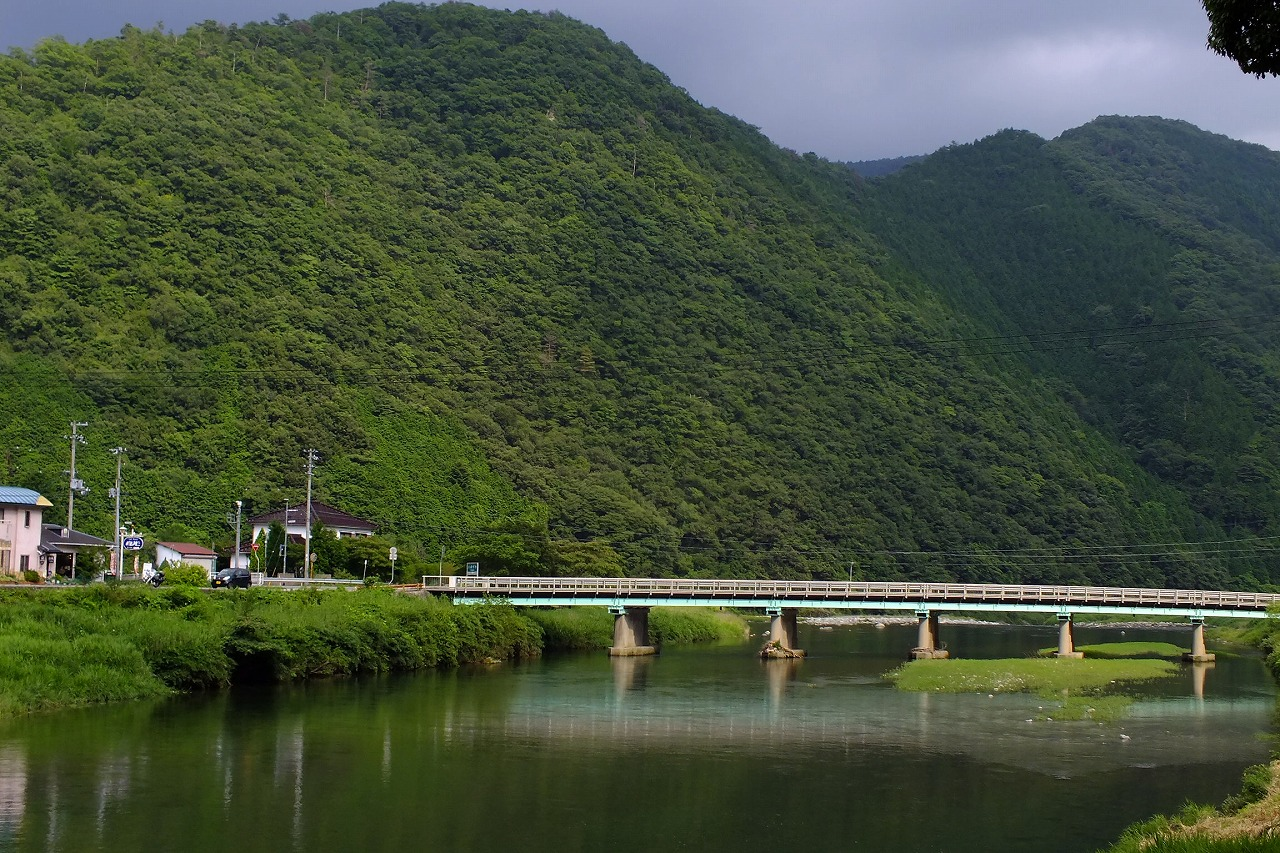 Ibo-River,Yoi,Yamasaki-cho,Shiso 揖保川 山崎町与位 〒671-2522 兵庫県宍粟市 山崎町杉ケ瀬３１８−１